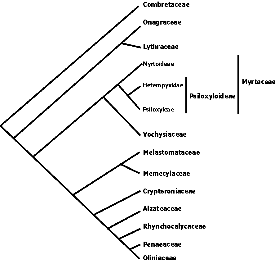 Tự vẽ lại theo APG II. Sử dụng tự do.